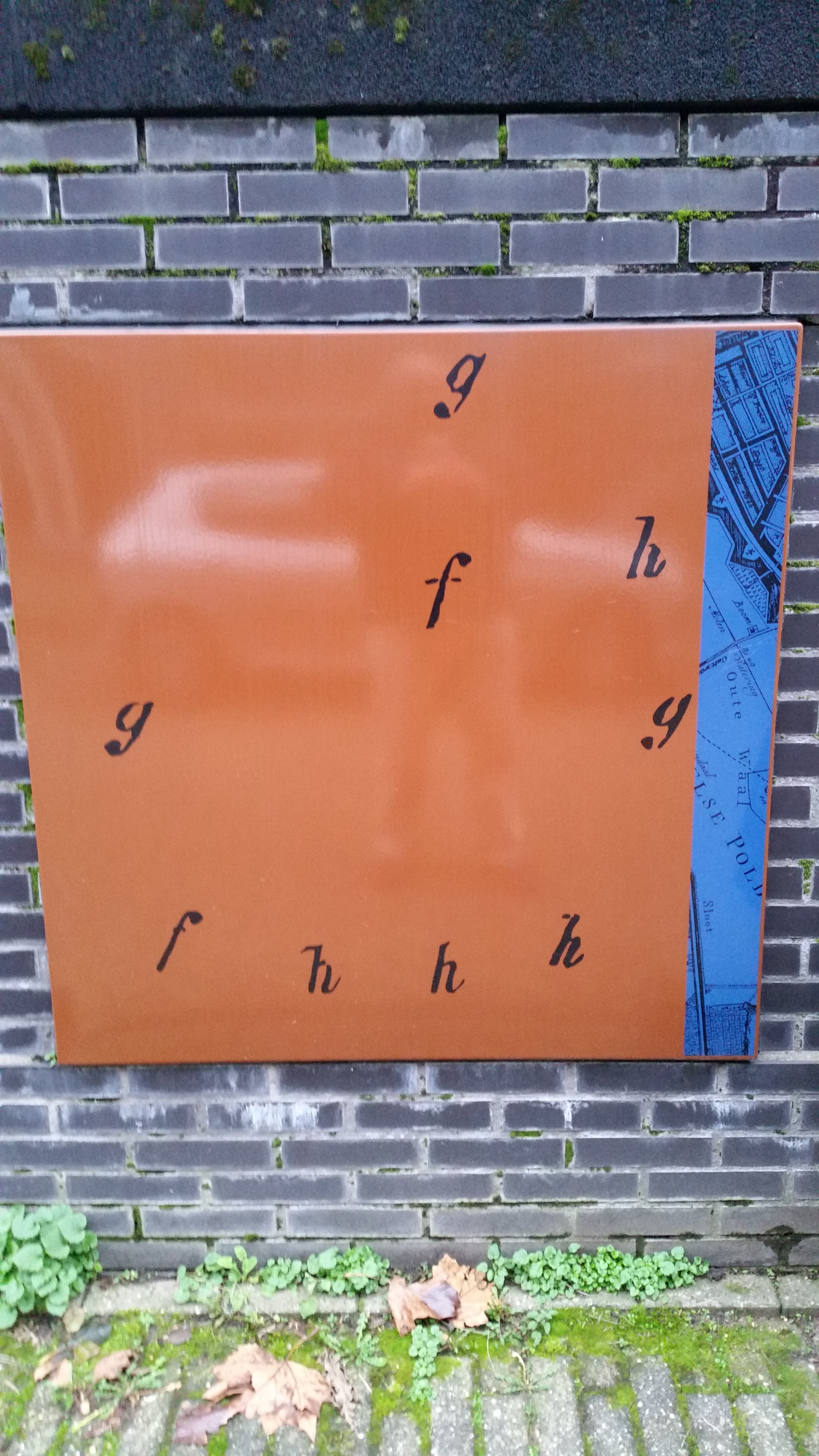 Impressies Oute Waal of Mollenmuur van Ingrid Pasmans in de Oetewalerstraat, Amsterdam-Oost; december 2019